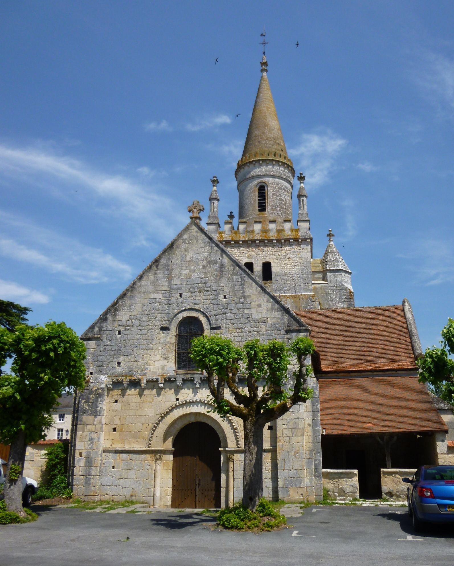 Eglise de Bonnes